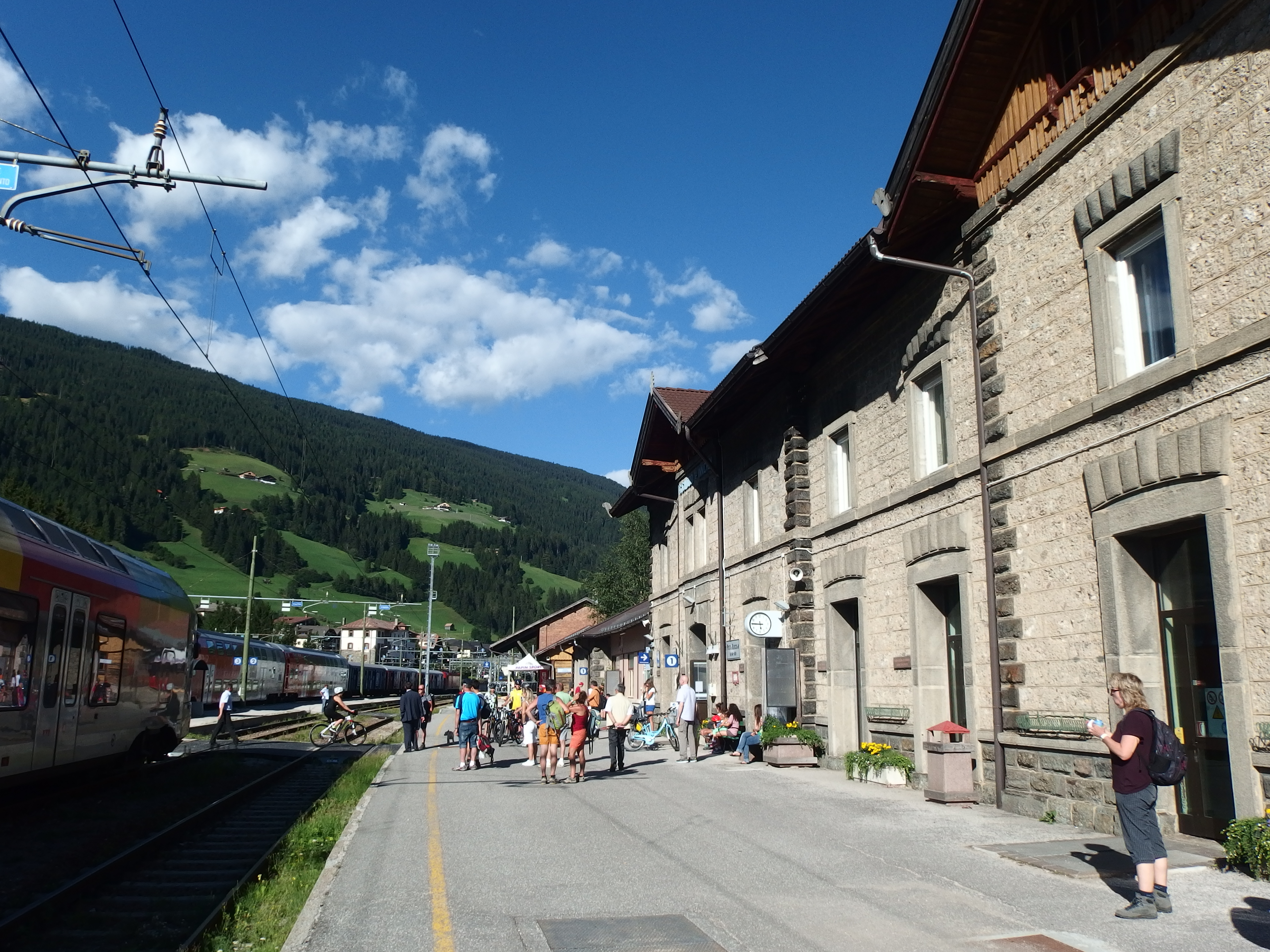 Bahnhof Innichen/San Candido, Südtirol, Italien.